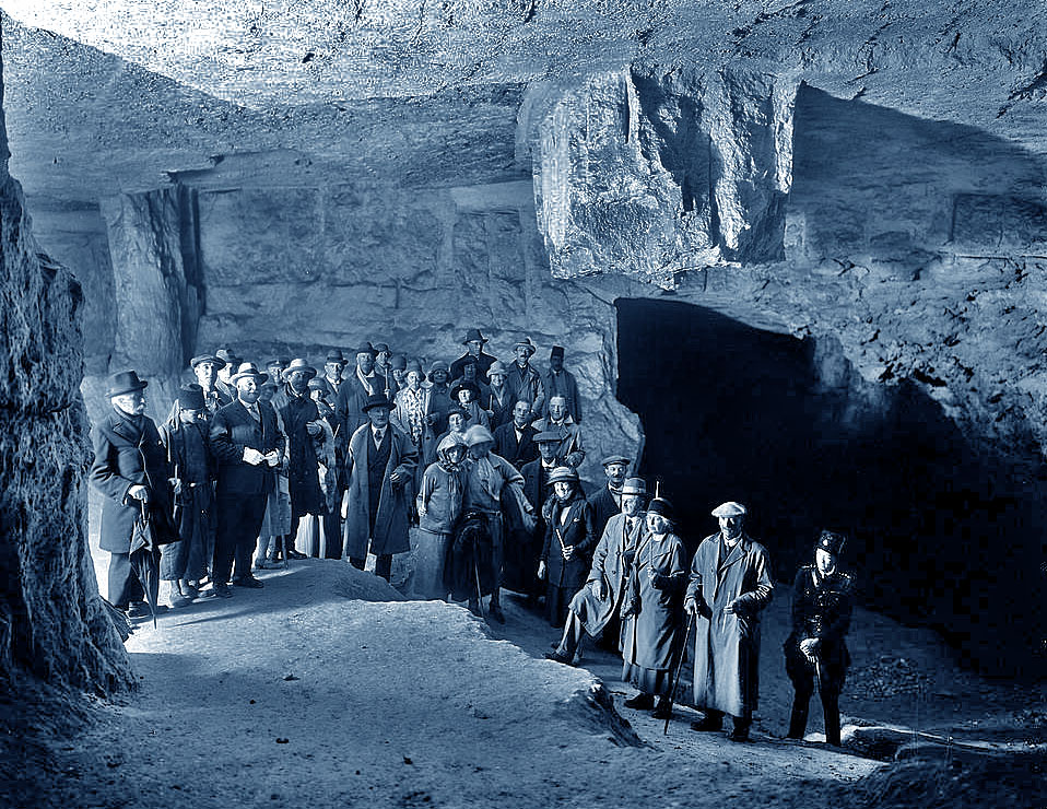 Jerusalem